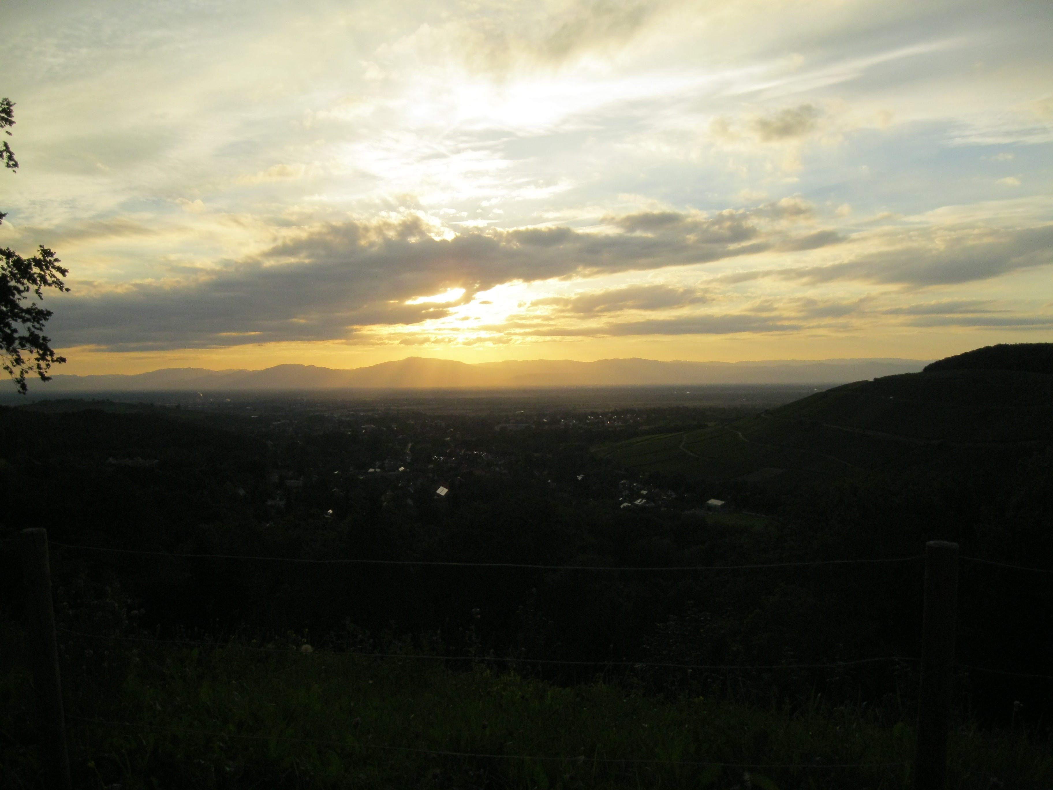 Vogesenblick von Badenweiler aus fotografiert/Schwarzwald